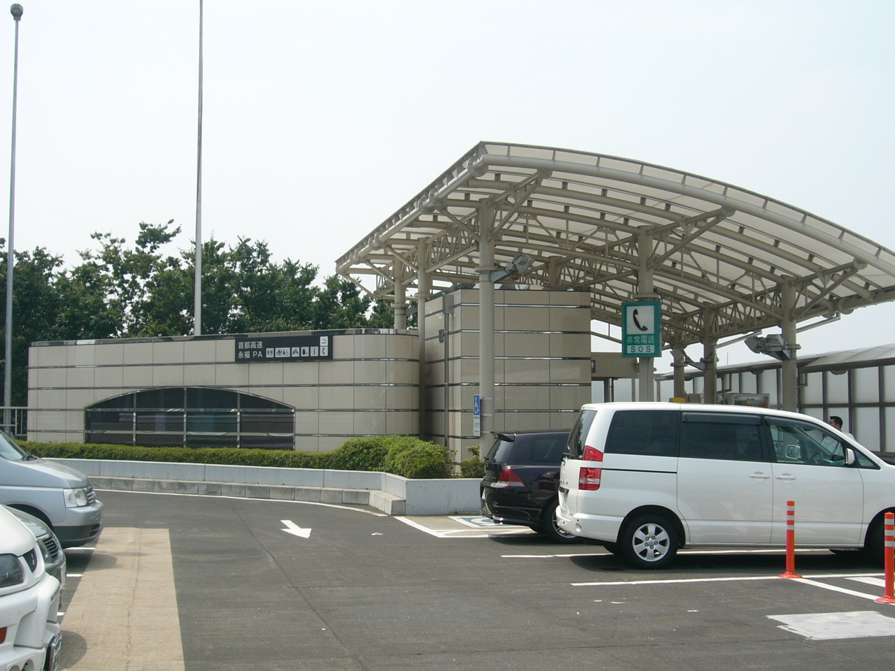 Eifuku Parking Area